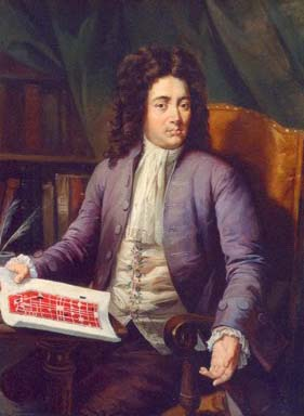 Retrato de Melchor de Macanáz